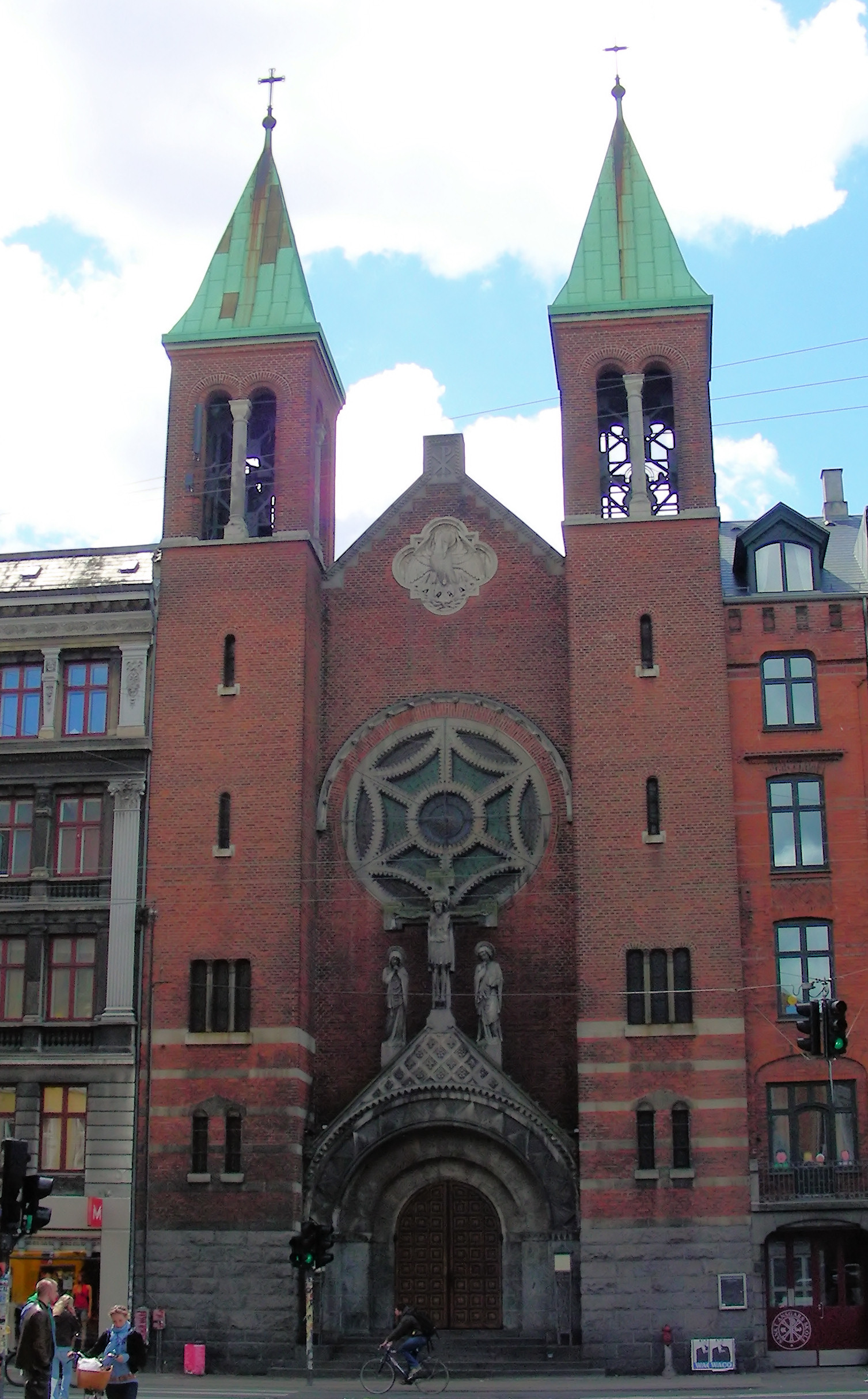 Sakramentskirken, Copenhagen, Denmark.